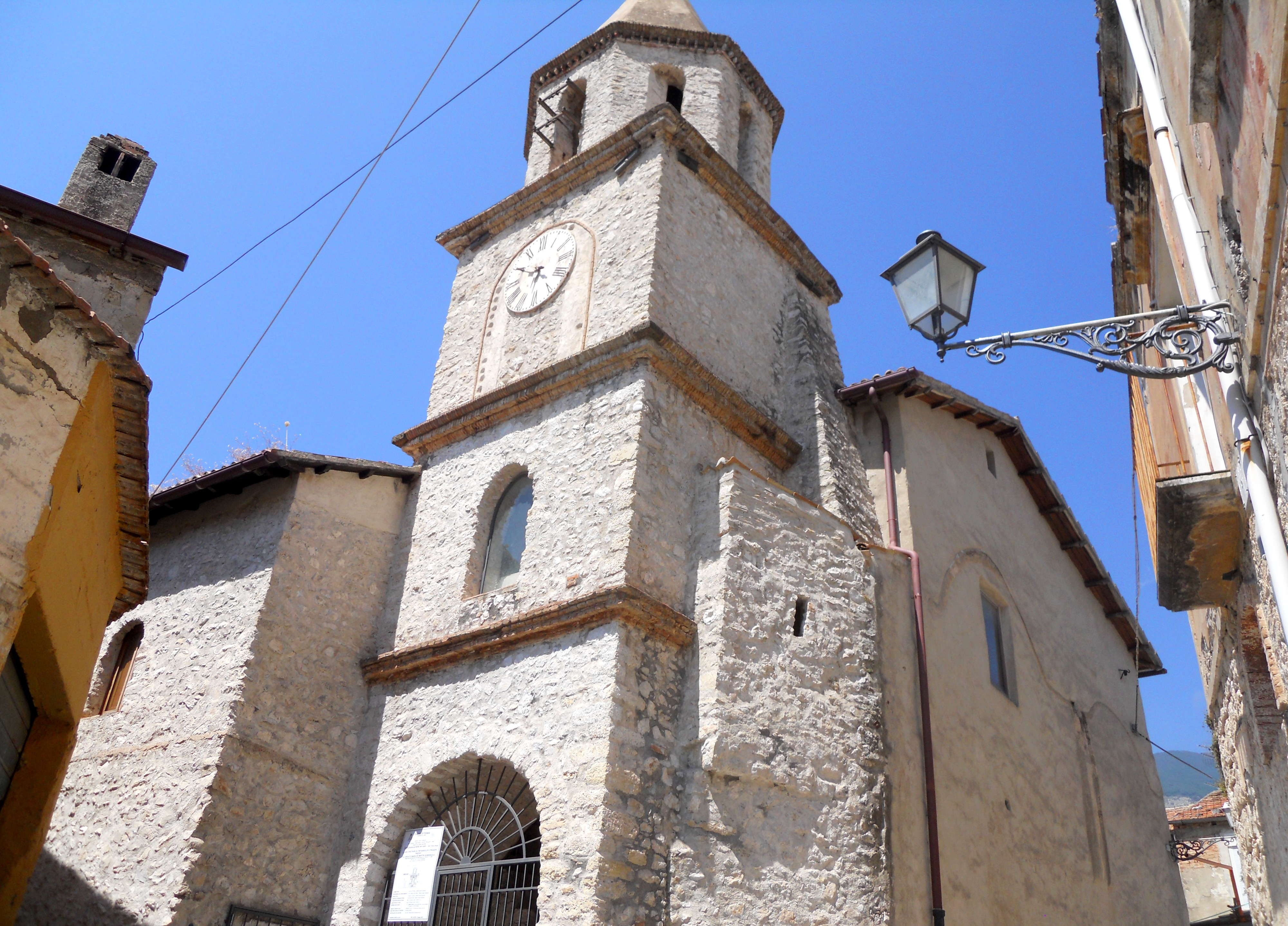 Esterno della chiesa di Santa Maria dei Martiri a Maranola